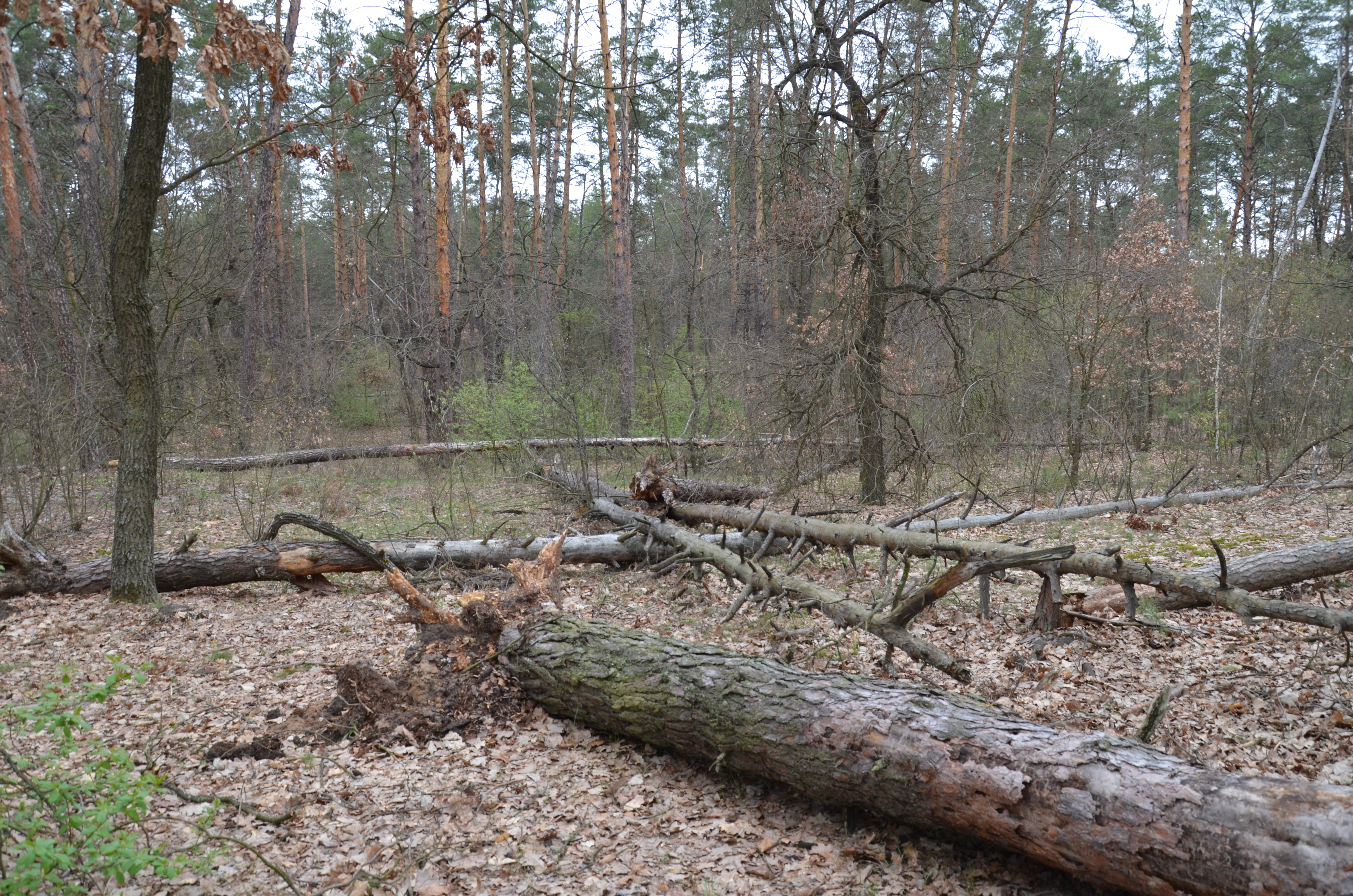 «Обухівський», Обухівський район, Обухівська та Українська міські ради, Козинська селищна рада